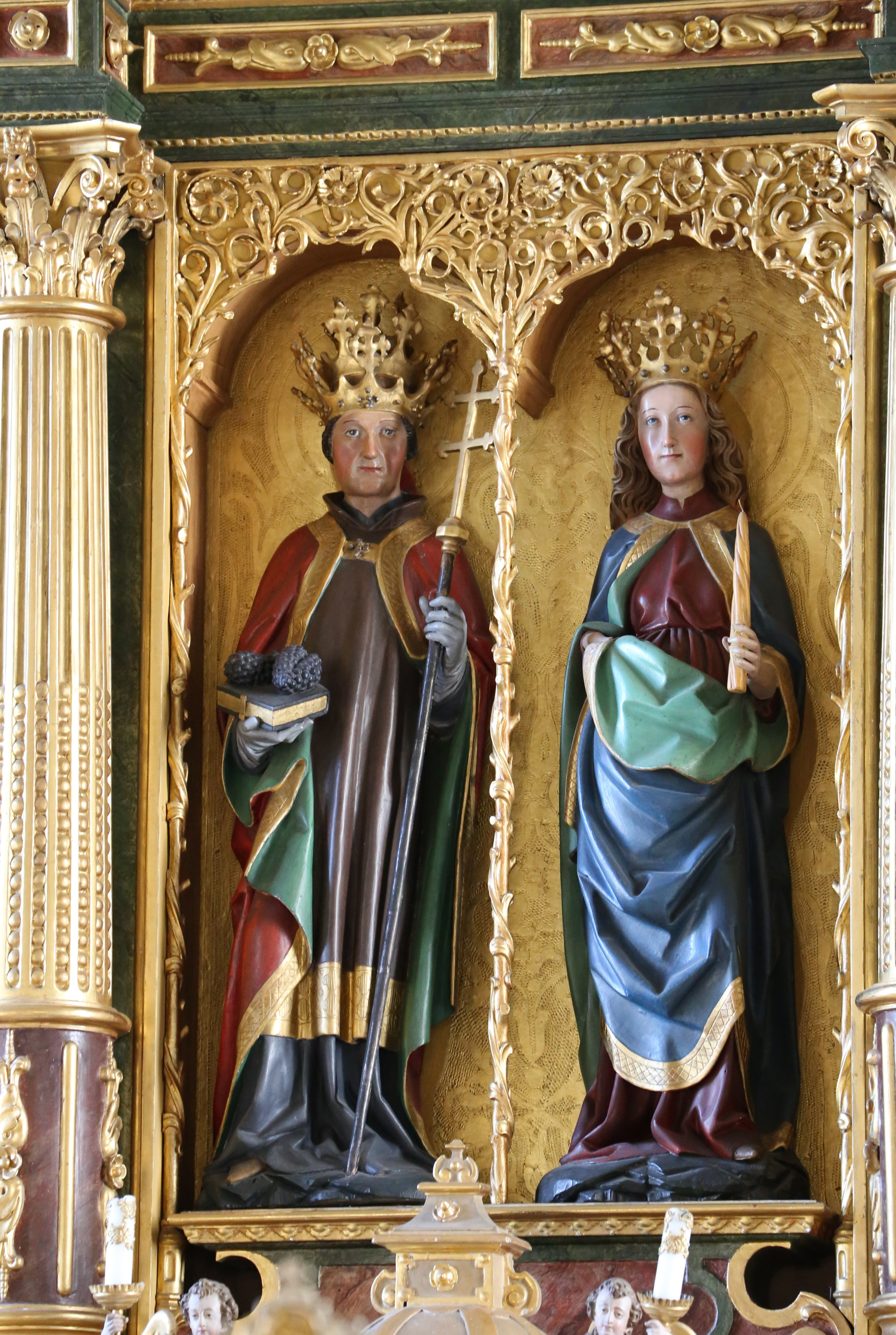 Katholische Pfarrkirche St. Agatha, Agatharied, Hausham; Spätgotischer Saalbau mit polygonalem Chor und Nordturm, 1505, um 1670 westlich erweitert und Chor barockisiert; mit Ausstattung